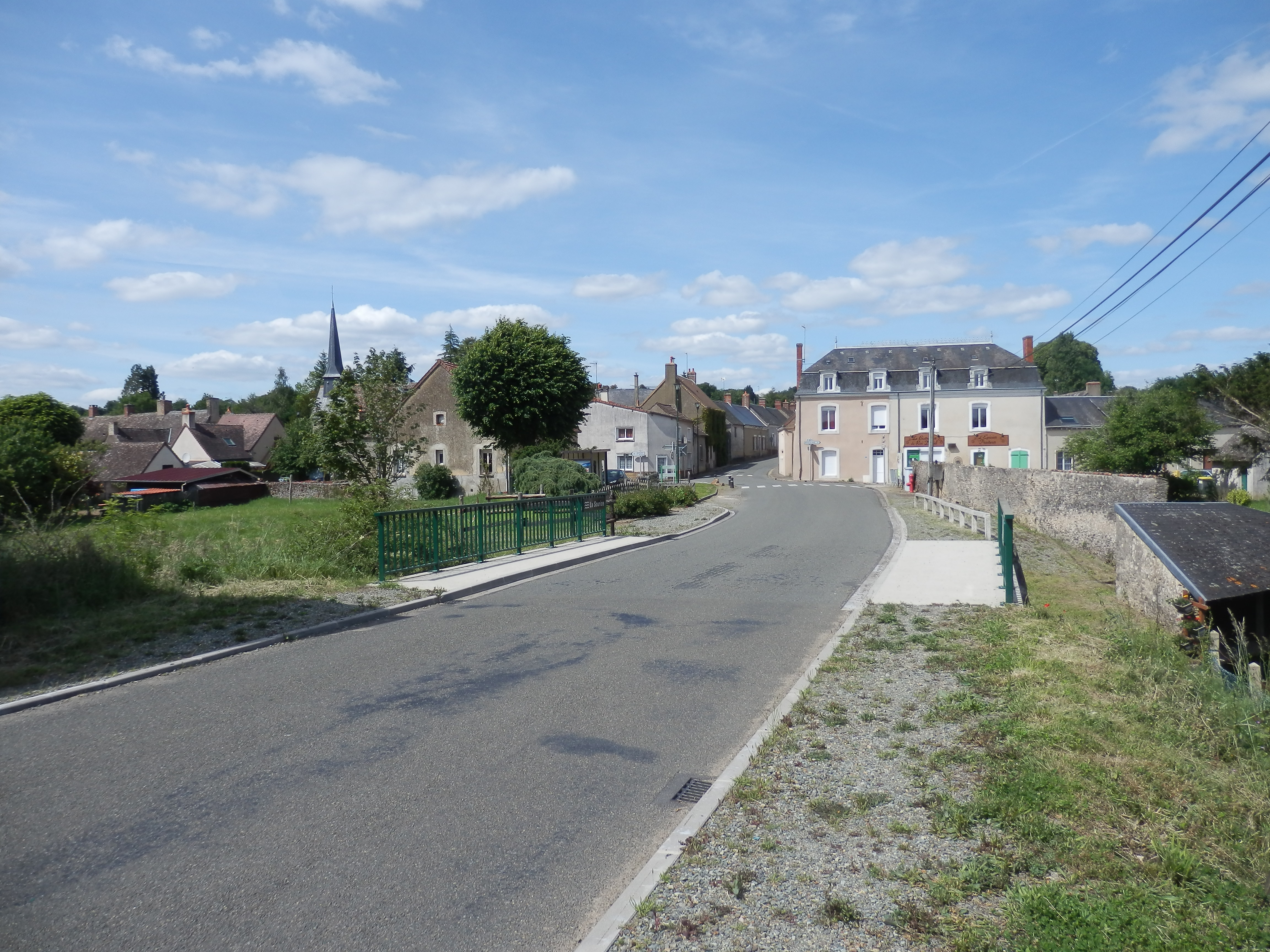 Surfonds vu depuis le pont sur la Sourice